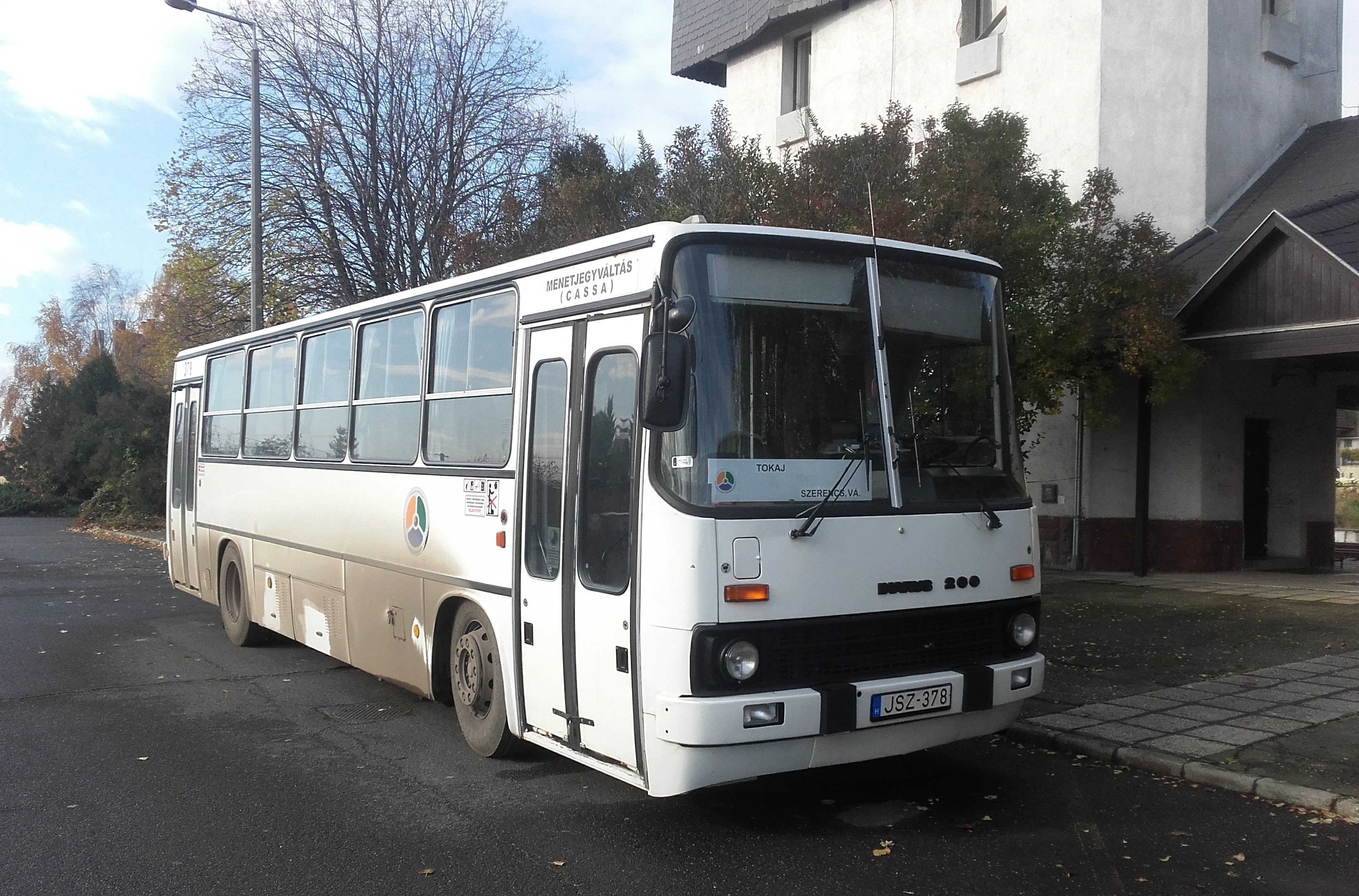 Az ÉMKK JSZ-378 rendszámú Ikarus 260 típusú busza Tokajon, a 3853-as helyközi járaton.